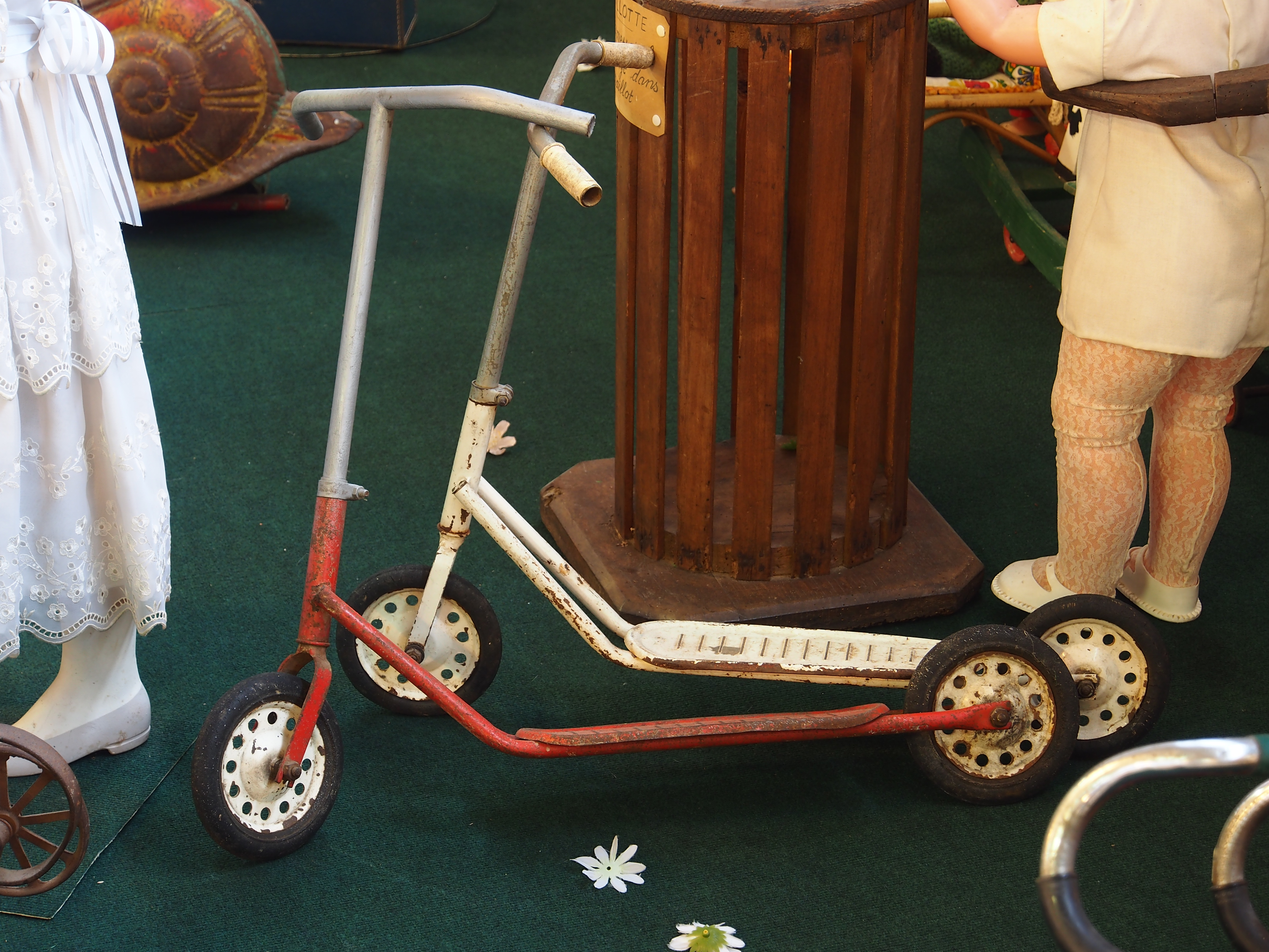 Photographed at the Musée Automobile de Vendée, France.